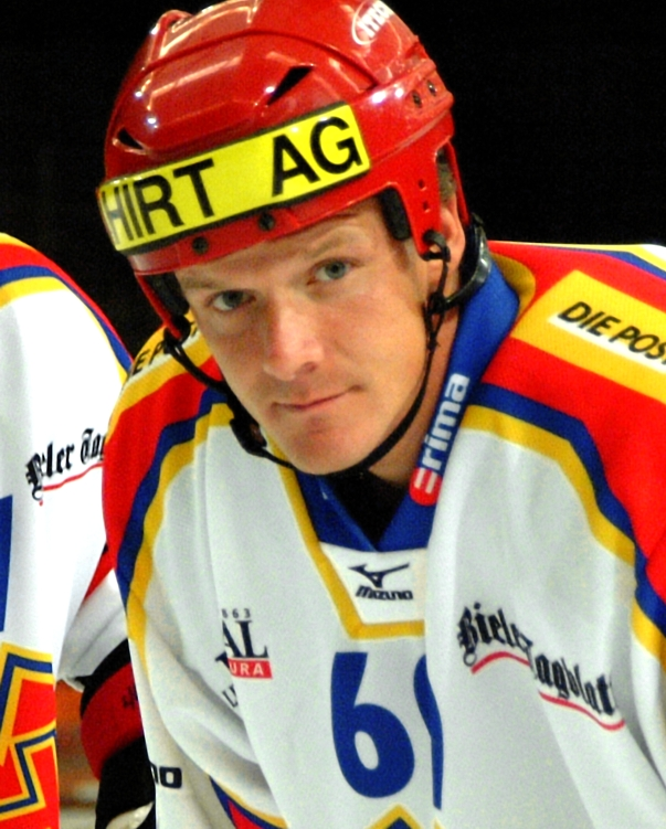 EHC-Biel-Spieler in der Saison 2004/05 Kevin Schläpfer